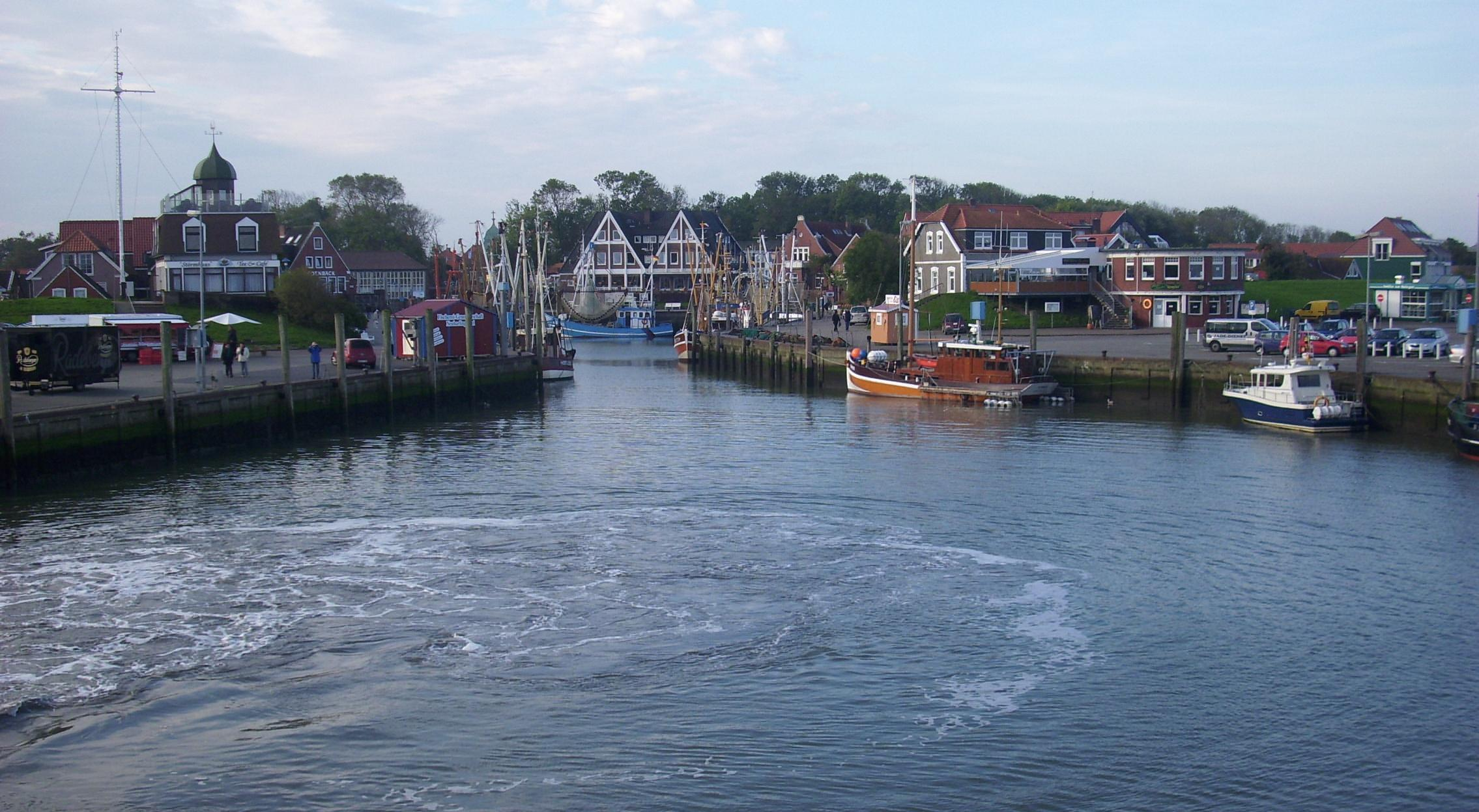 Hafenansicht von Neuharlingersiel, Blick von Norden in Richtung Hafenbecken